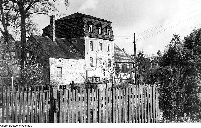 Original image description from the Deutsche Fotothek Rietschen-Viereichen-Mocholz. Ehem. Mühle